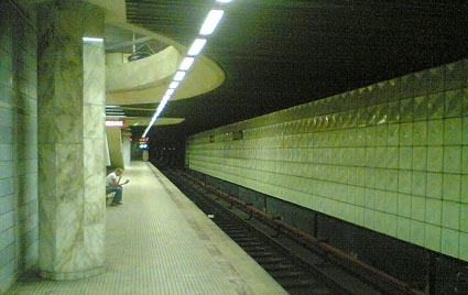 Gorjului este o stație de metrou din București.